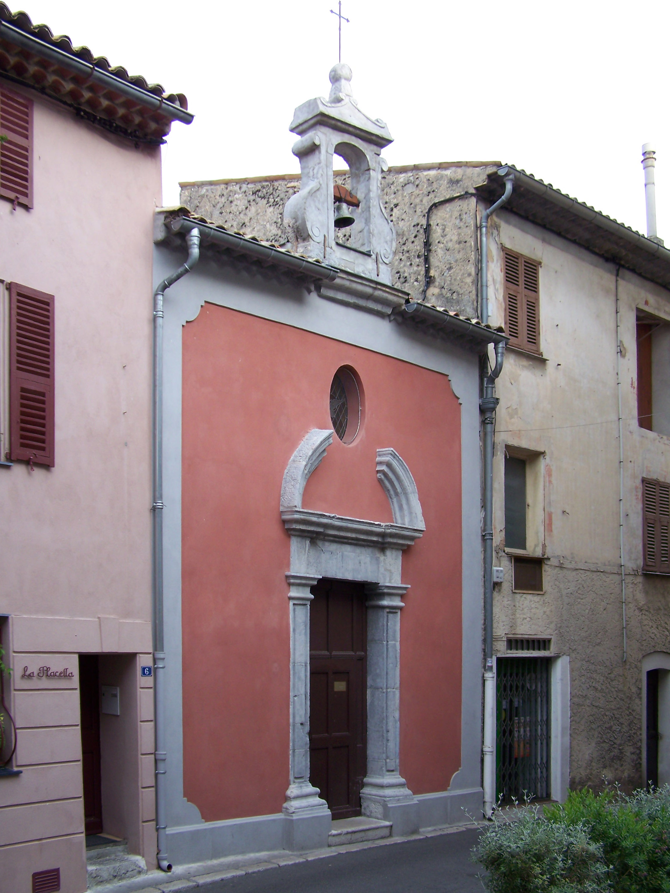 Chapelle de la confrérie des pénitents noirs (16° siècle) dans le village de Levens (Alpes-Maritimes, France)